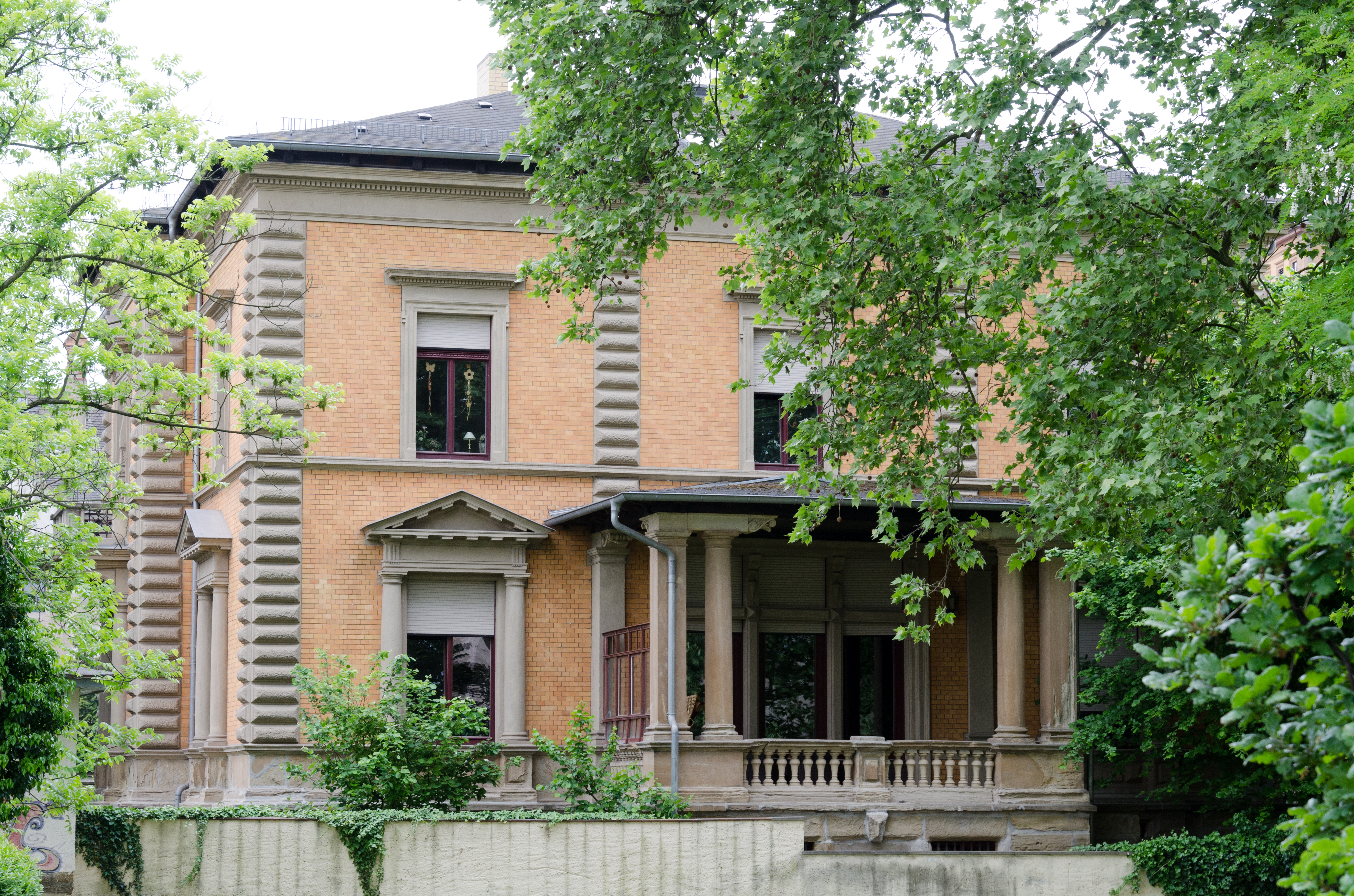 Zeitz, Badstubenvorstadt 16 und 16a